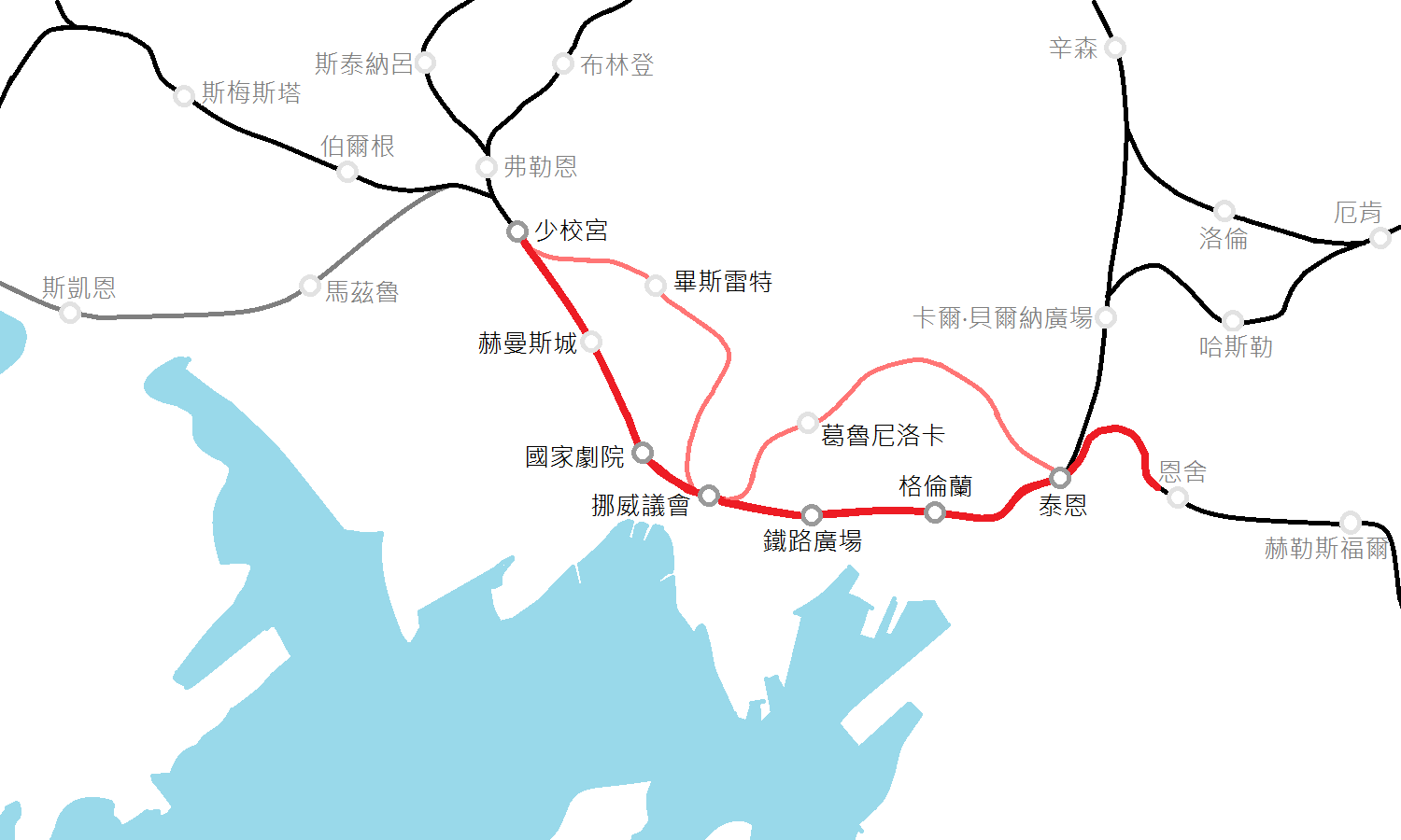 共用隧道的未來地圖。紅色路線表示共用隧道、粉紅色線表示新隧道、灰線表示未來計畫中路線（福尼布線）。